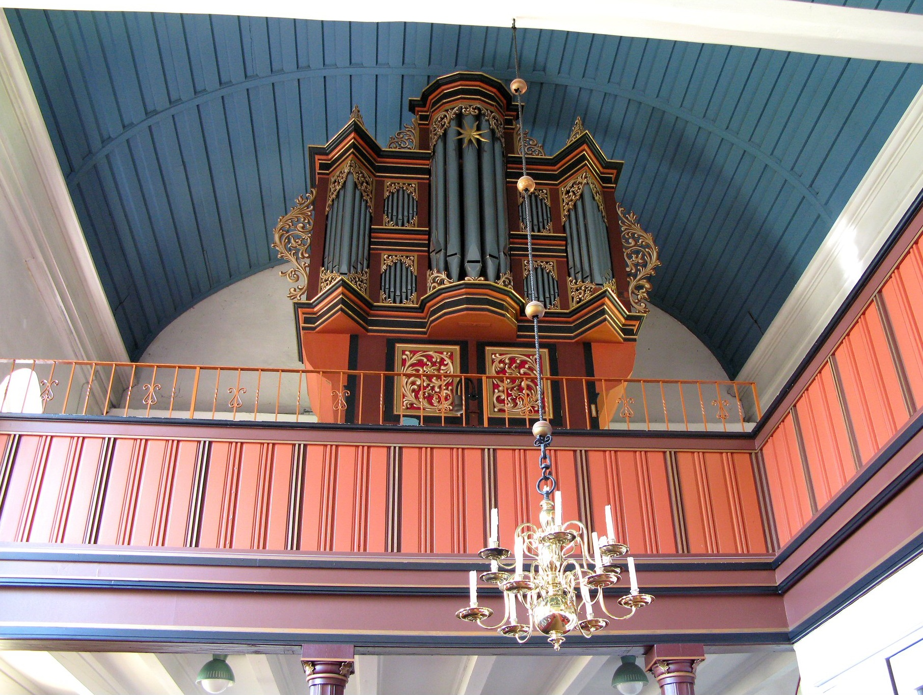 Orgel in Petkum, Emden